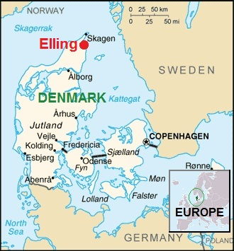 CIA Denmark map